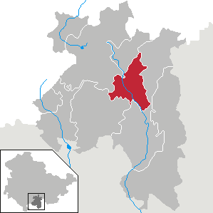 Steinach in Thüringen, Landkreis Sonneberg